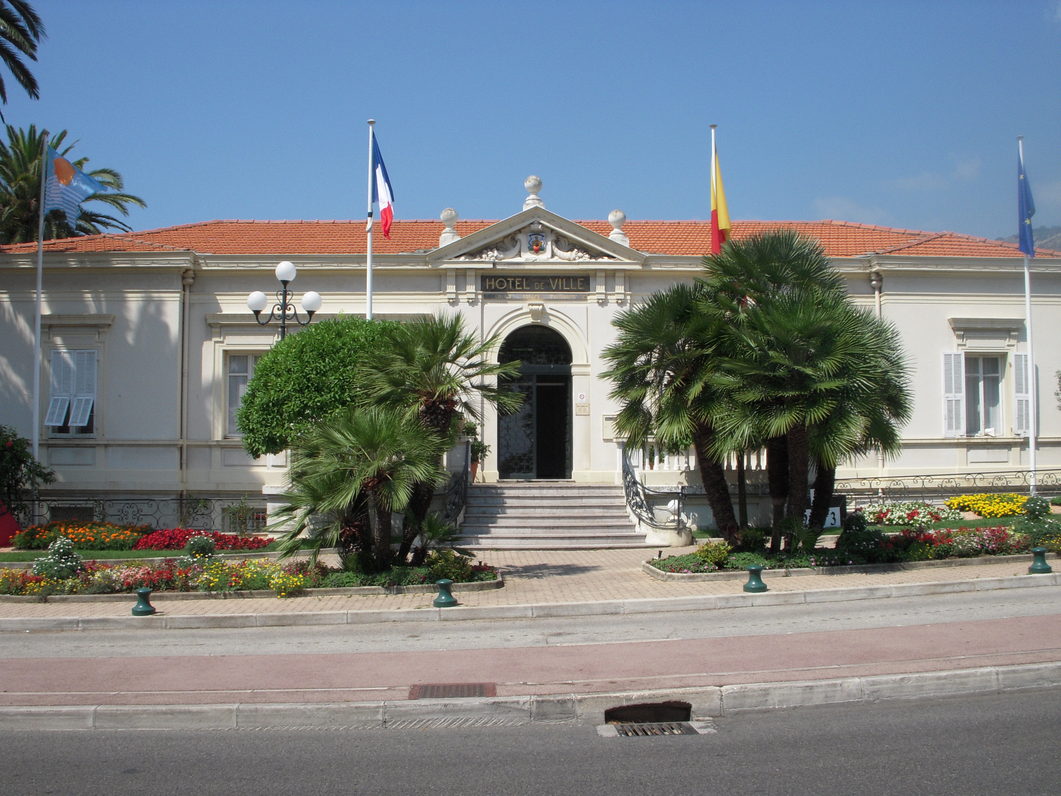 Rådhuset i Roquebrune-Cap-Martin, hvor J.O. Krag og Helle Virkner blev gift i 1959. 26. juni 2009.